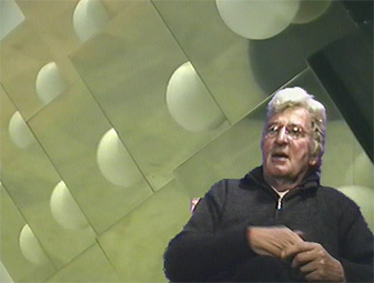 Portrait de Joël Stein